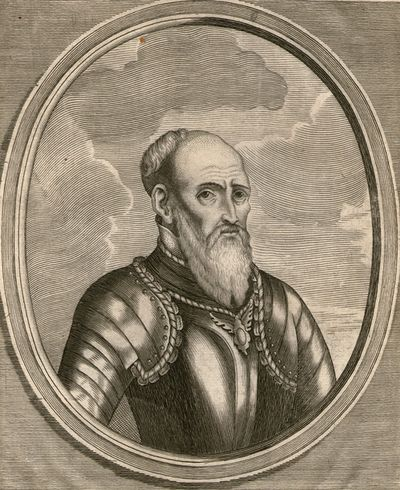 Stefan Czarniecki wg miedziorytu Cornelisa Meyssensa